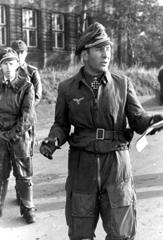 Theodor Weißenberger Deutschland. Eichenlaubträger Hauptmann Weißenberger, Gruppenkommandeur in einem Jagdgeschwader bei einer Nachbesprechung. Prop.-Kp. Lw.KBZ 15 Film-Nr.: 8279/10 Bildberichter: Schödl 4.10.44